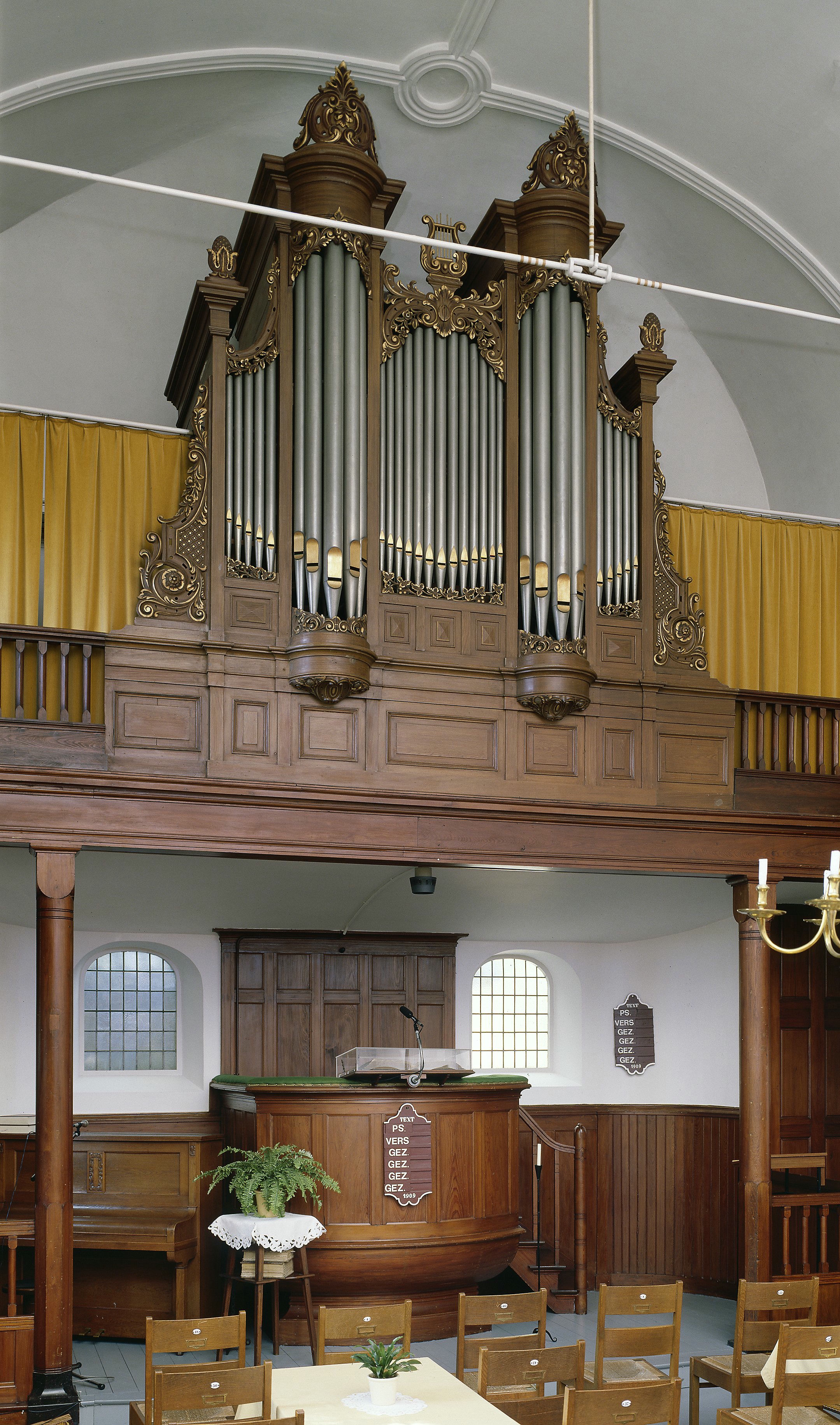 Doopsgezinde Kerk: Interieur, aanzicht orgel, orgelnummer 935 (opmerking: Gefotografeerd voor Het Historische Orgel in Nederland 1886-1894, bladzijde 166)